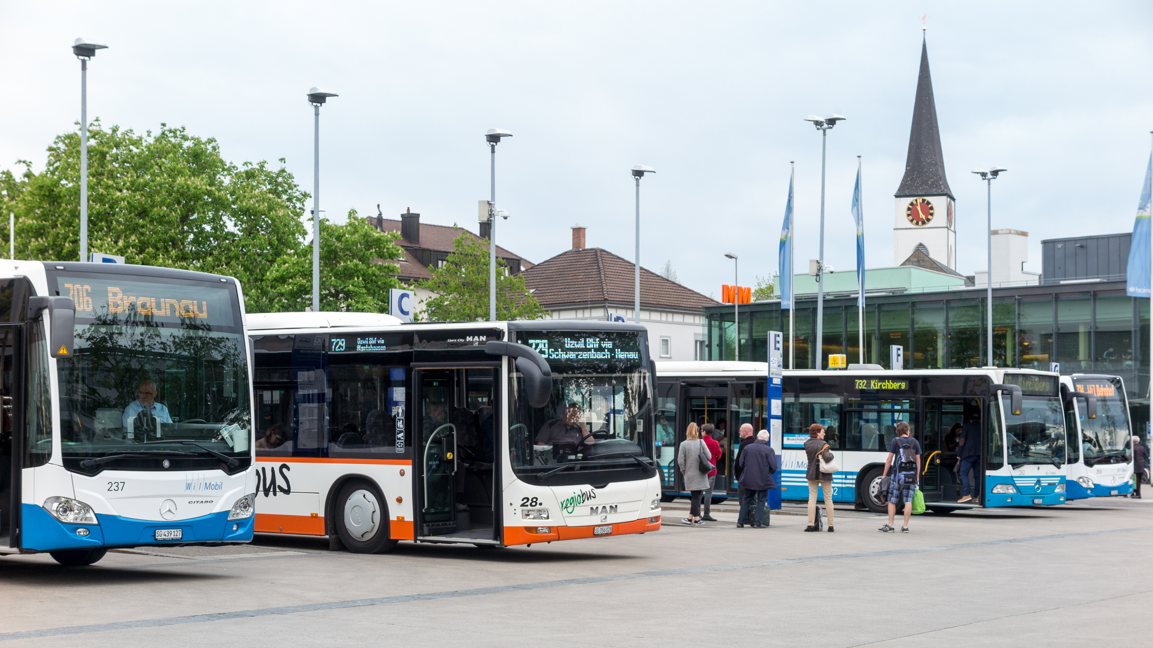 Busstation am Bahnhof Wil SG